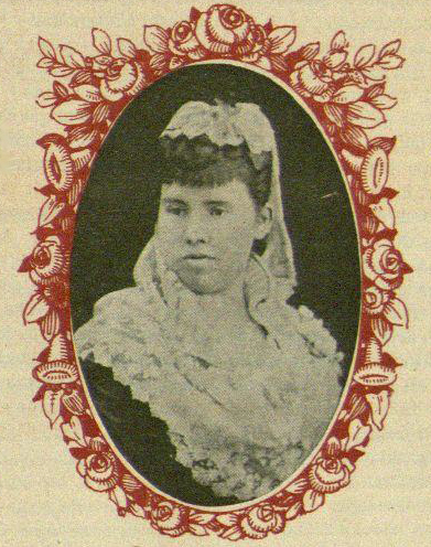 Elena Maseras, médica catalana.